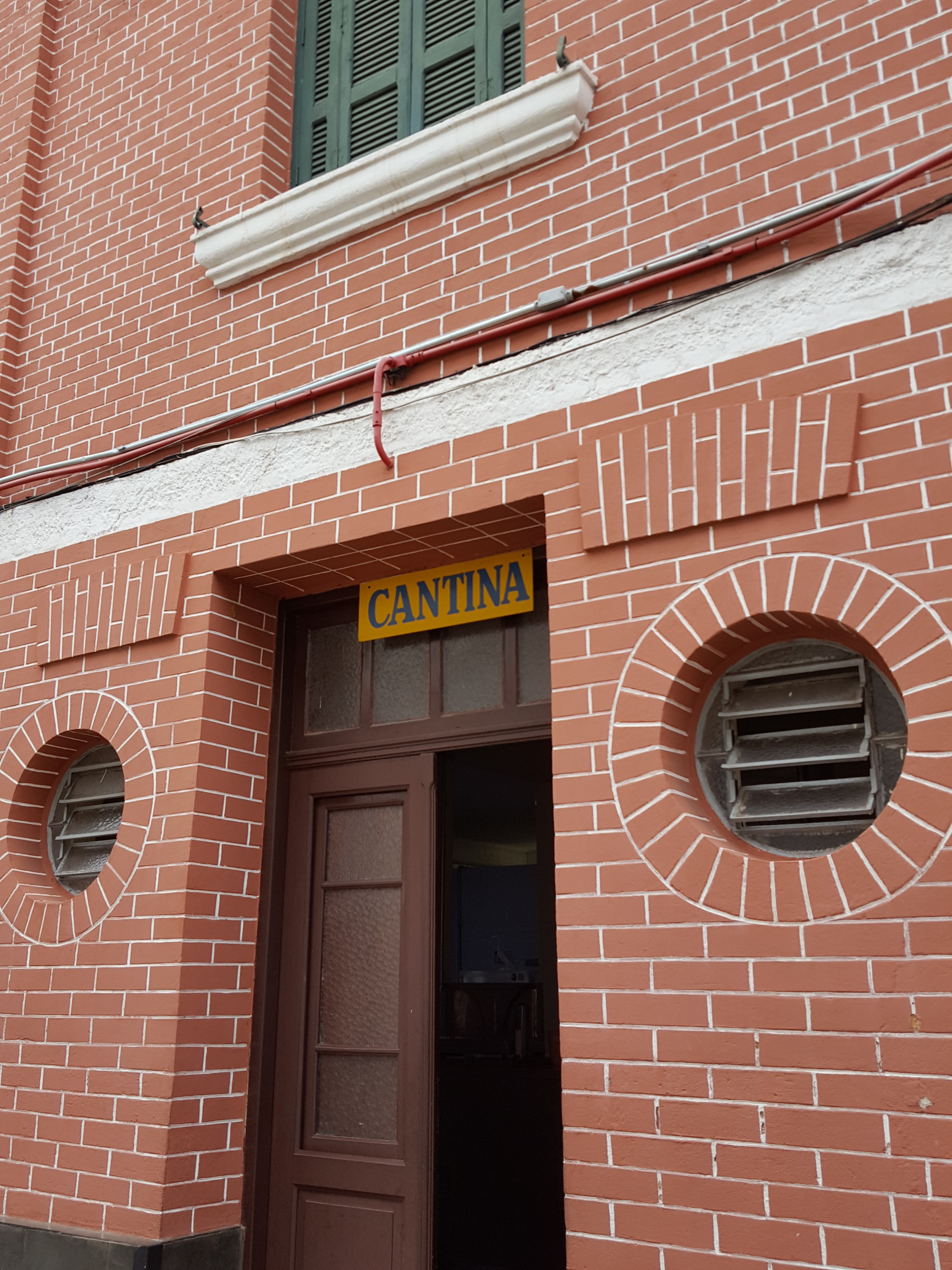 Detalhe da face norte do Prédio do Ensino Fundamental do Instituto Padre Chico, em São Paulo (SP), Brasil.